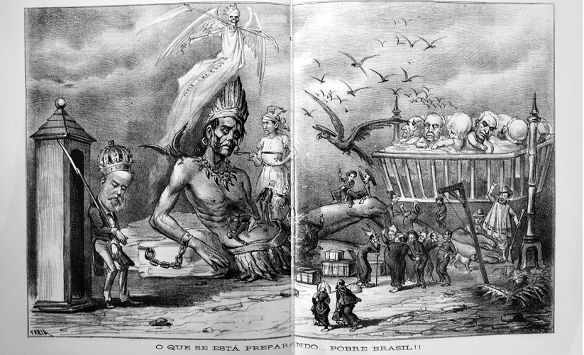 O Mosquito, 16-02-1876